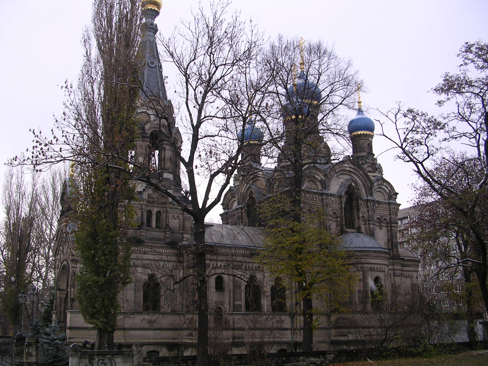 Russisch-Orthodoxe Kirche in Dresden